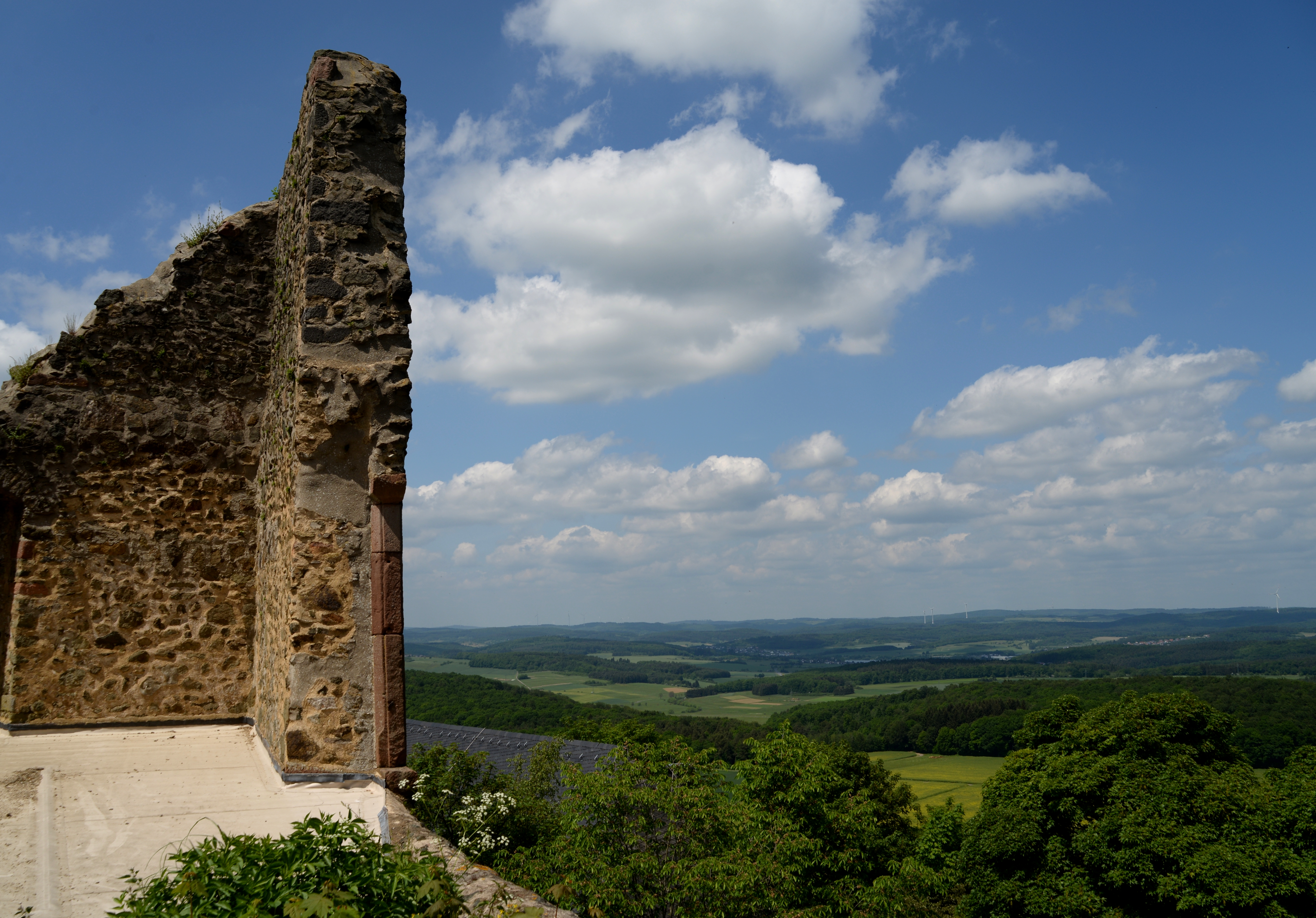 Burg Hohensolms, Ruine This is a photograph of an architectural monument.It is on the list of cultural monuments of Hohenahr